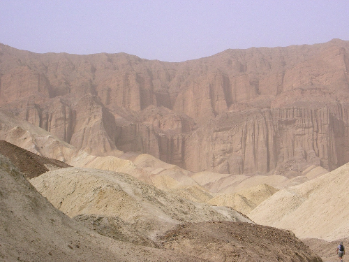 Golden Canyon, Death Valley, Californie Auteur : Utilisateur:Urban Photographie prise au cours d'un voyage en Californie en avril 2004 GFDL